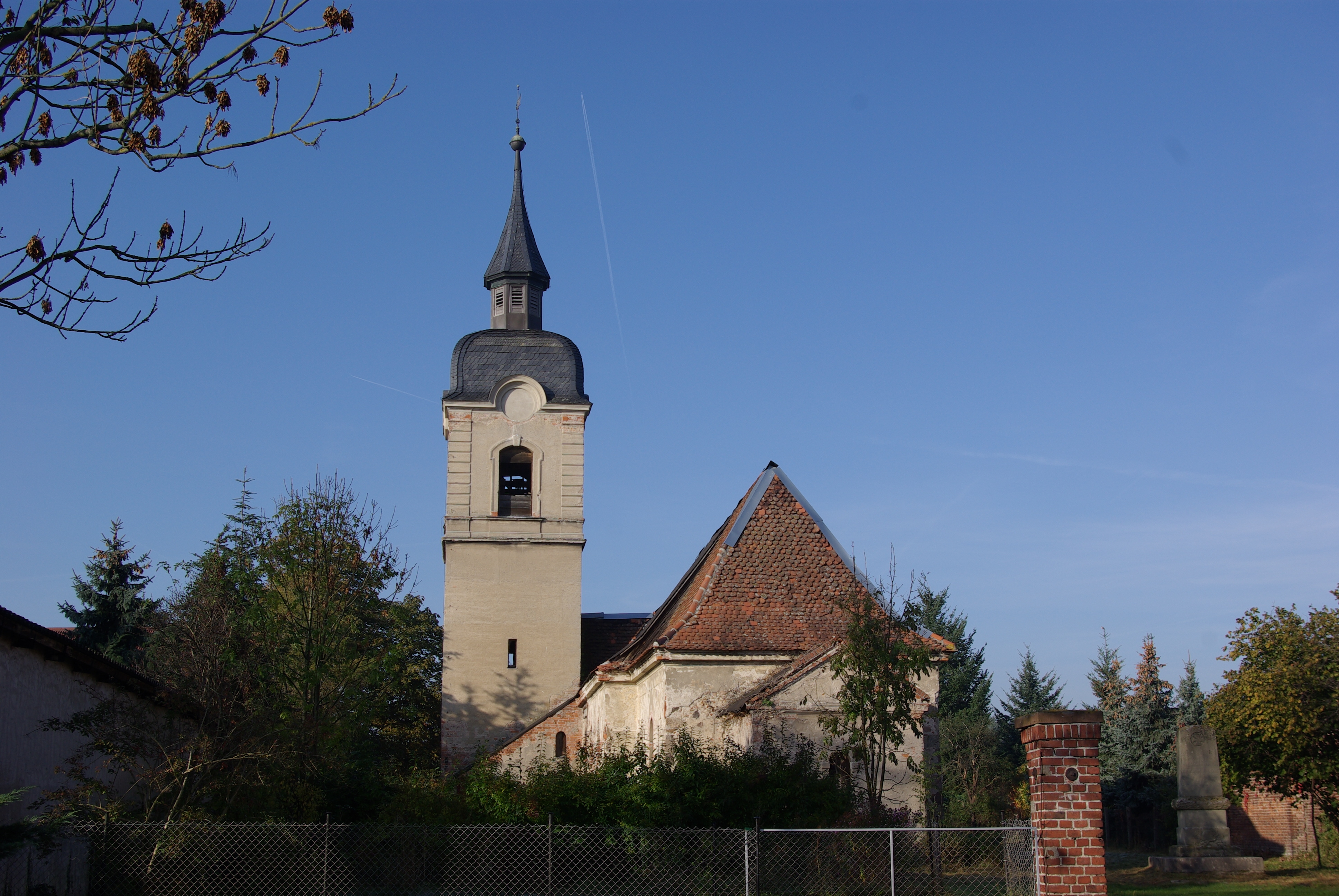 Wenzlow Ortsteil Grüningen in Brandenburg. Die Kirche steht unter Denkmalschutz.